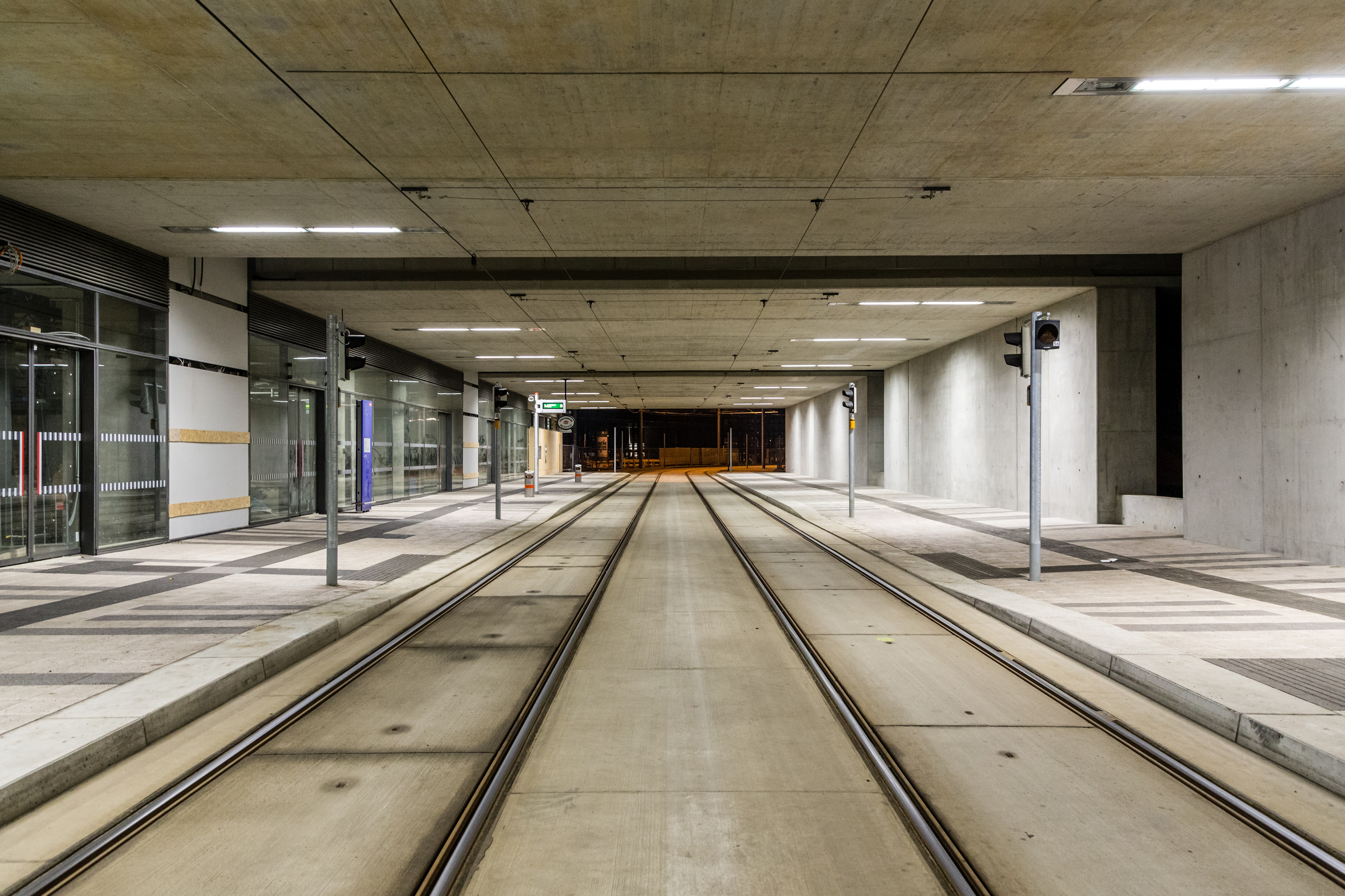 Straßenbahnhaltestelle Hauptbahnhof Ost der Linie D in der Karl-Popper-Straße in Wien.